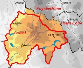 Limites du Bailliage des Montagnes d'Auvergne superposé à la carte du département du Cantal (France)